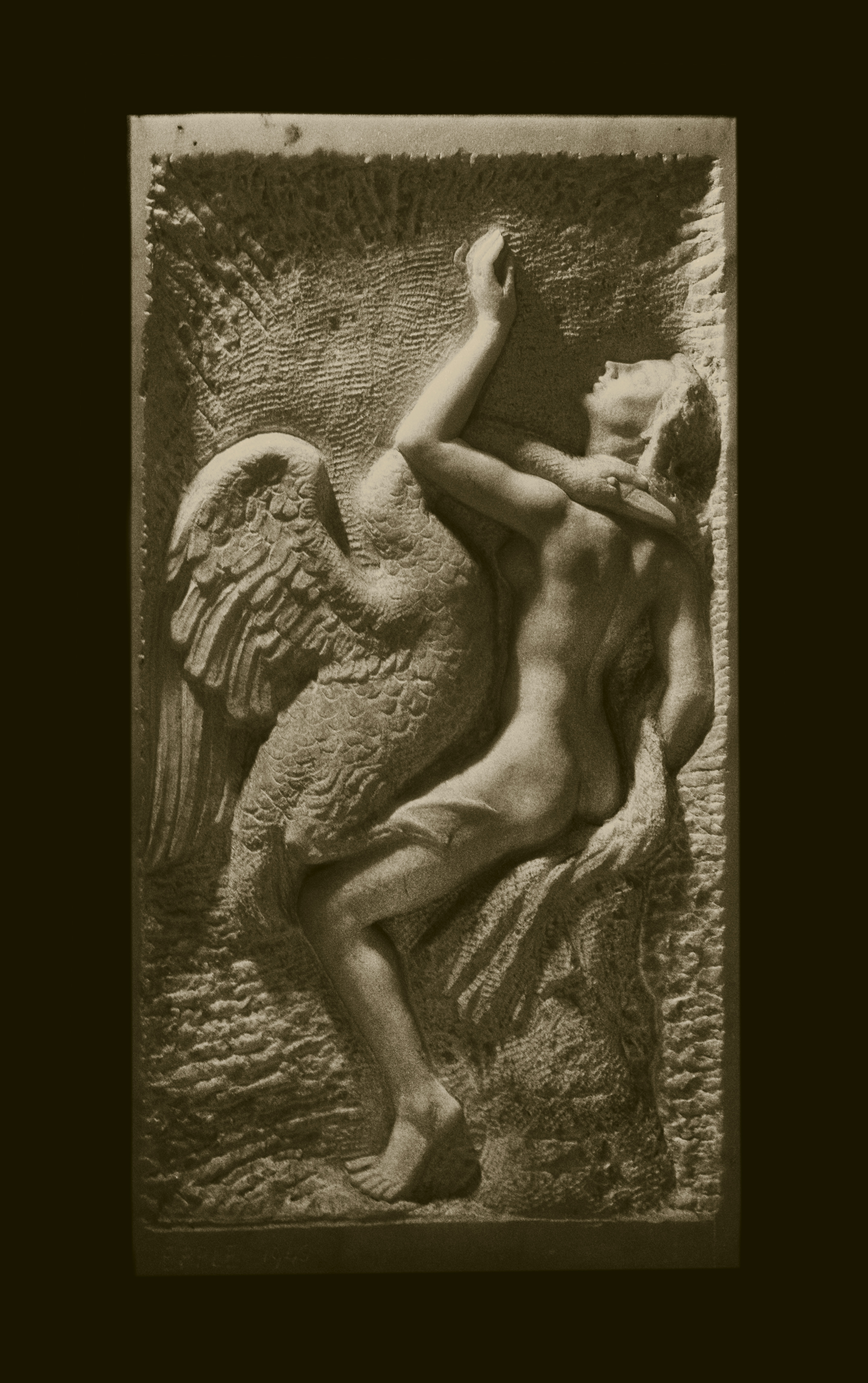 Leda en de Zwaan, marmer, 1943